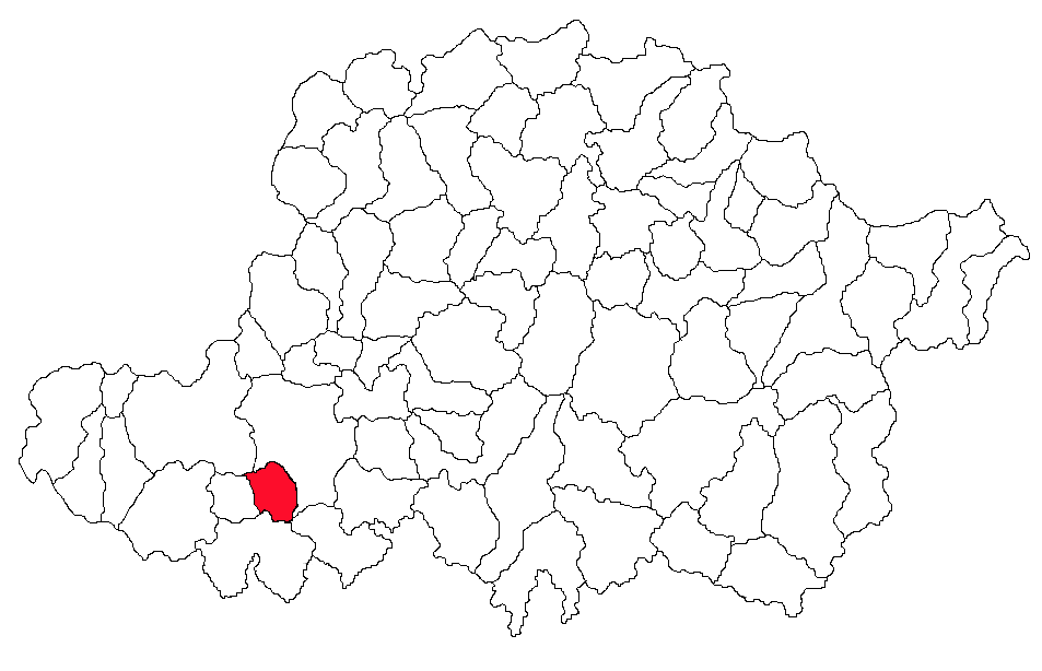 Lag vu Saderlach im Chrais Arad